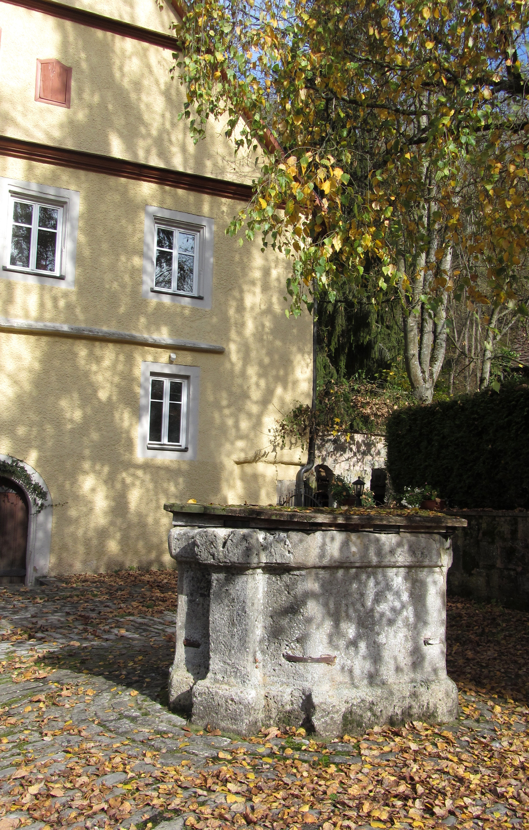 Steinerner Brunnen 16./17.Jahrhundert vor der ehemaligen Schmelzmühle am Taubertalweg 20 in Rothenburg ob der Tauber